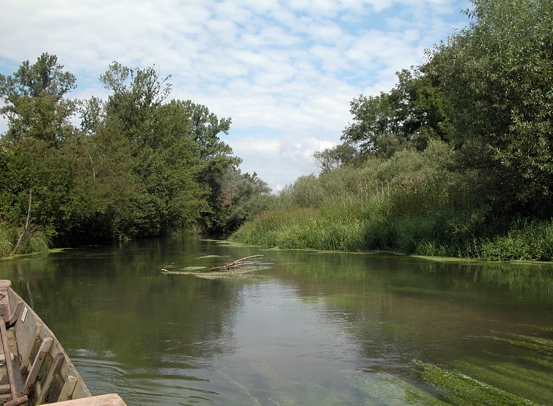 Taubergiessen, Deutschland, Germany